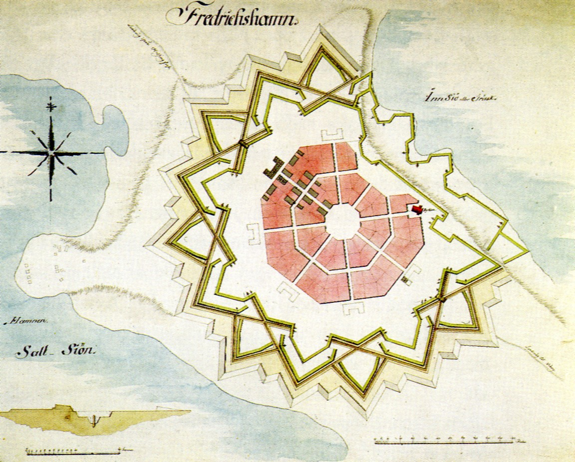 Stadsplan för Fredrikshamn (Hamina)